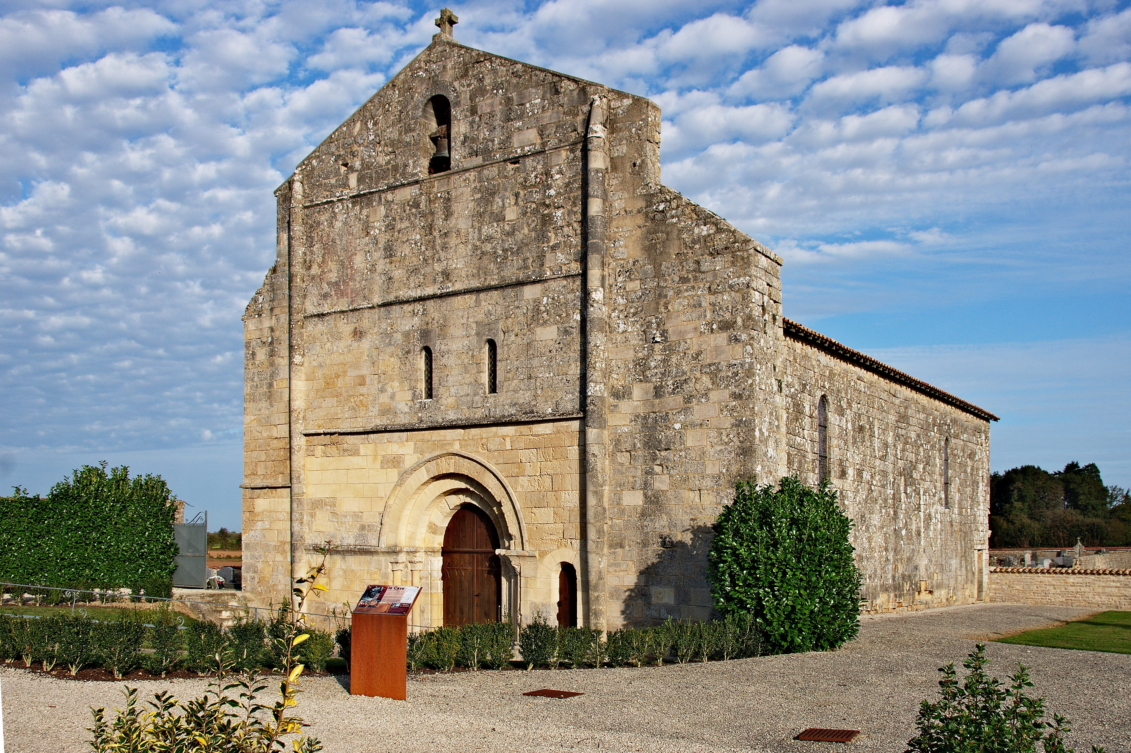 Église Notre-Dame des Alleuds